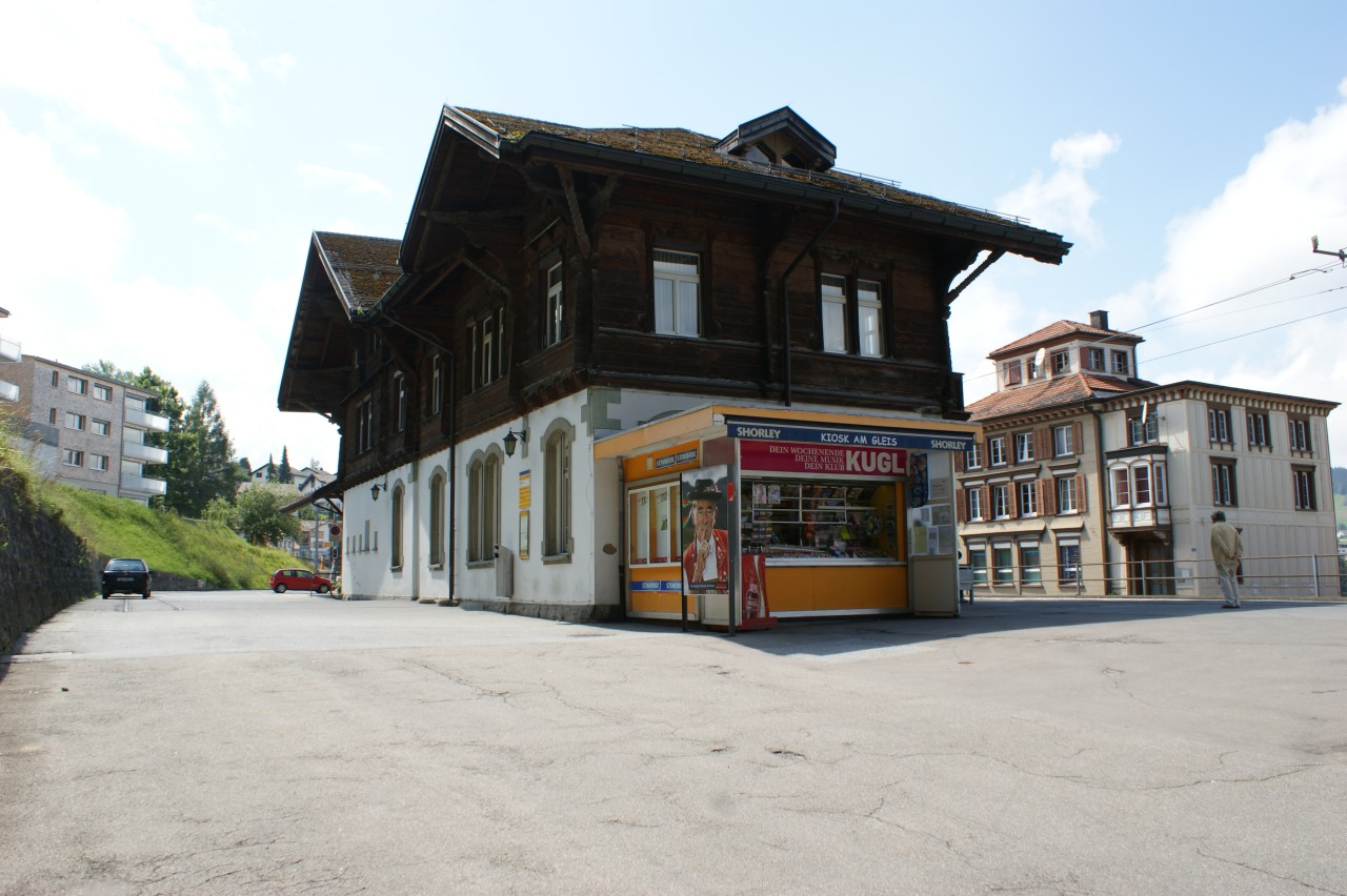 Rückseite des Bahnhofgebäudes Trogen